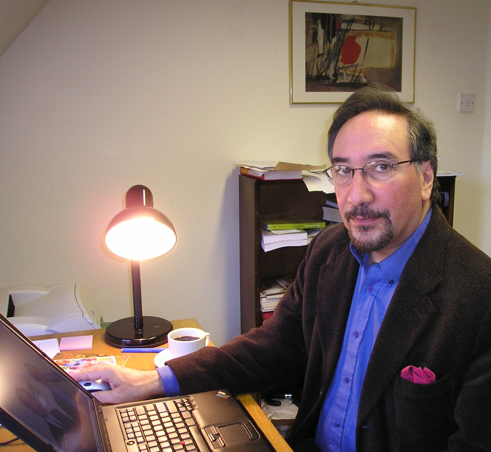 Dr Homa Katouzian